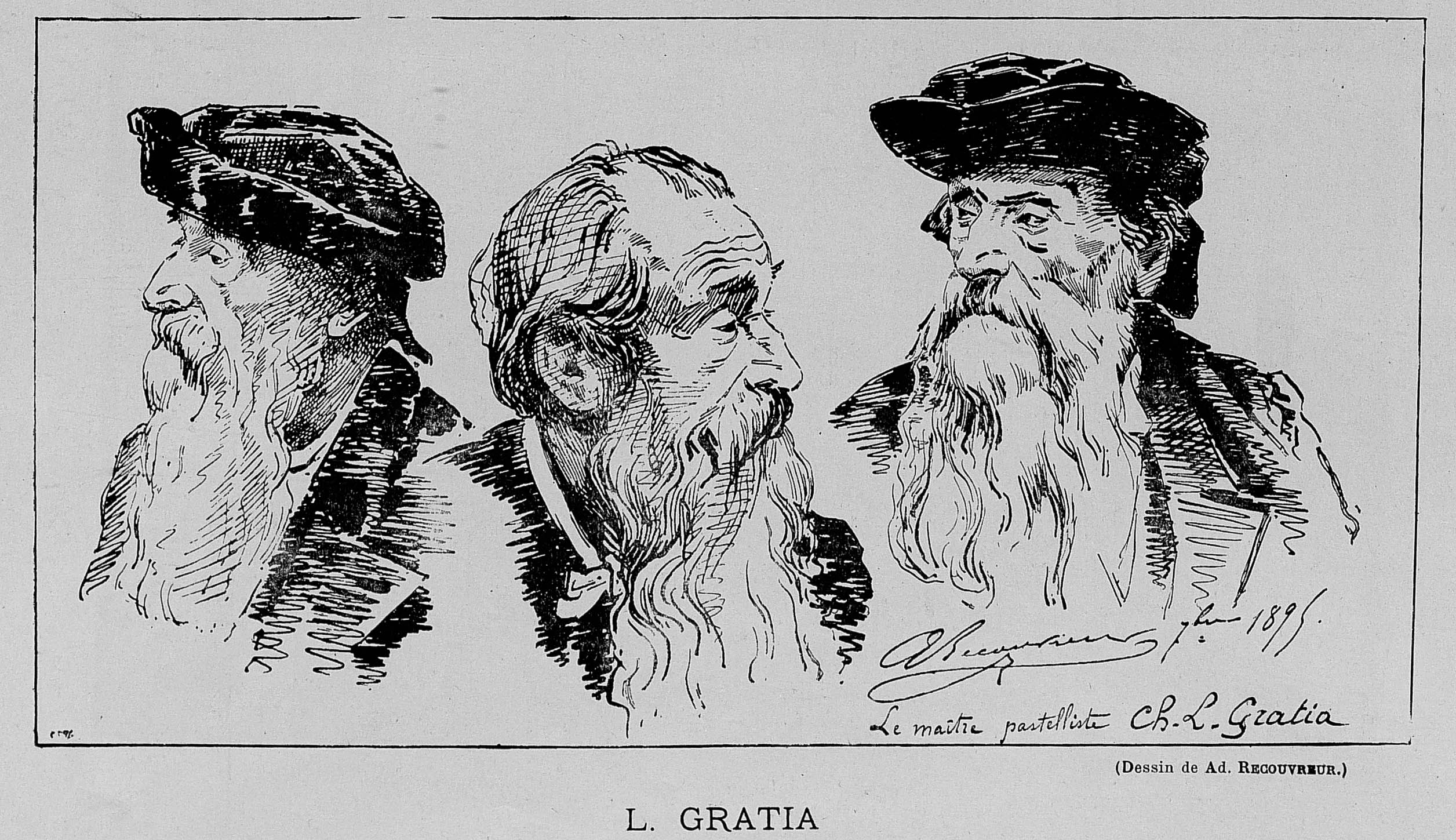 Extrait de La Lorraine artiste, année 1895, planches